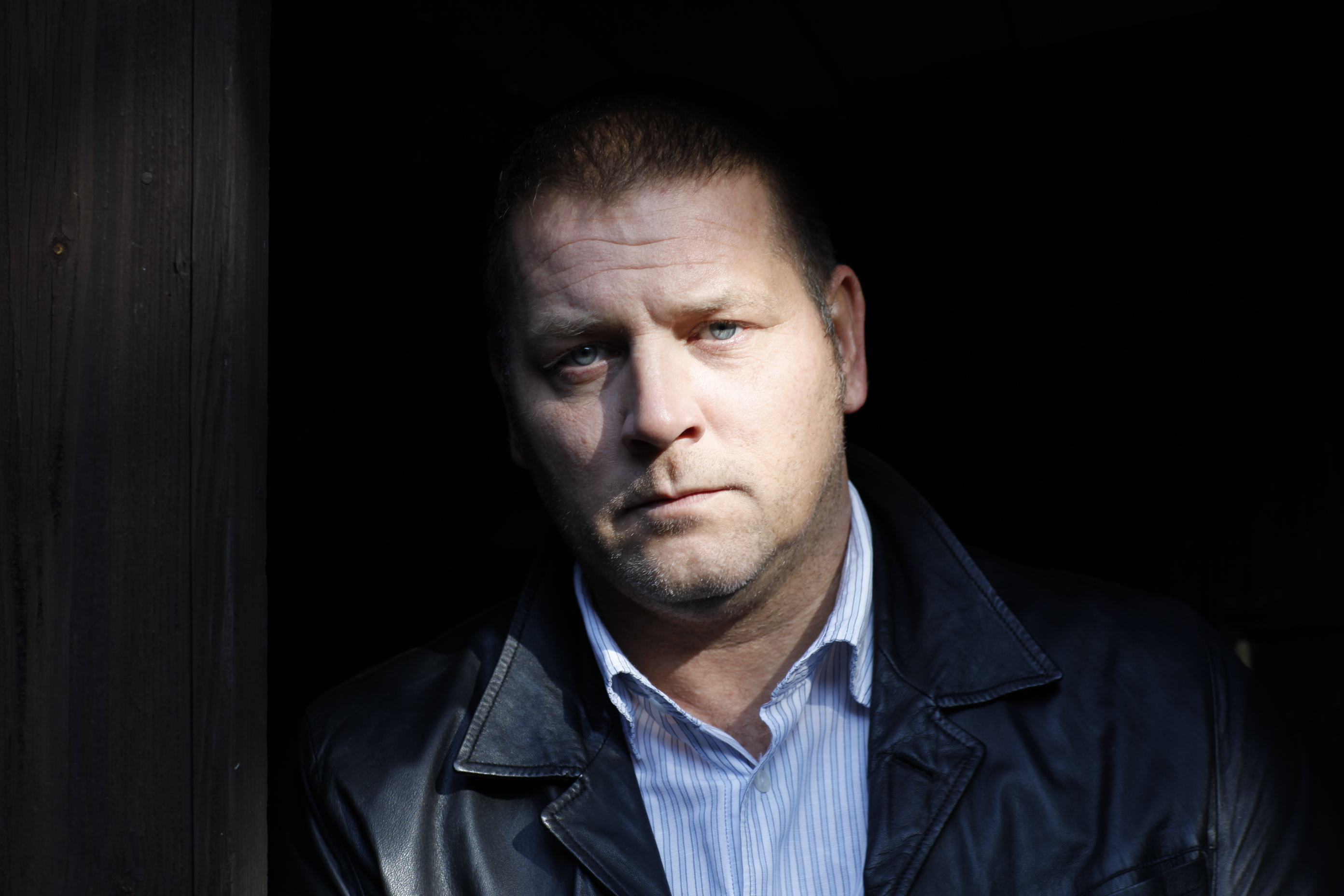 Michael Jäger für seine Bewerbung 2.0